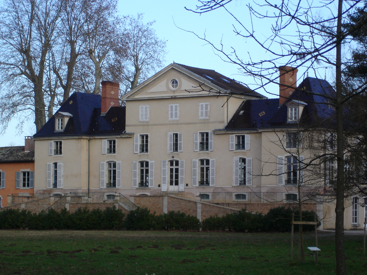 Façade ouest du château de Pont-de-Veyle.